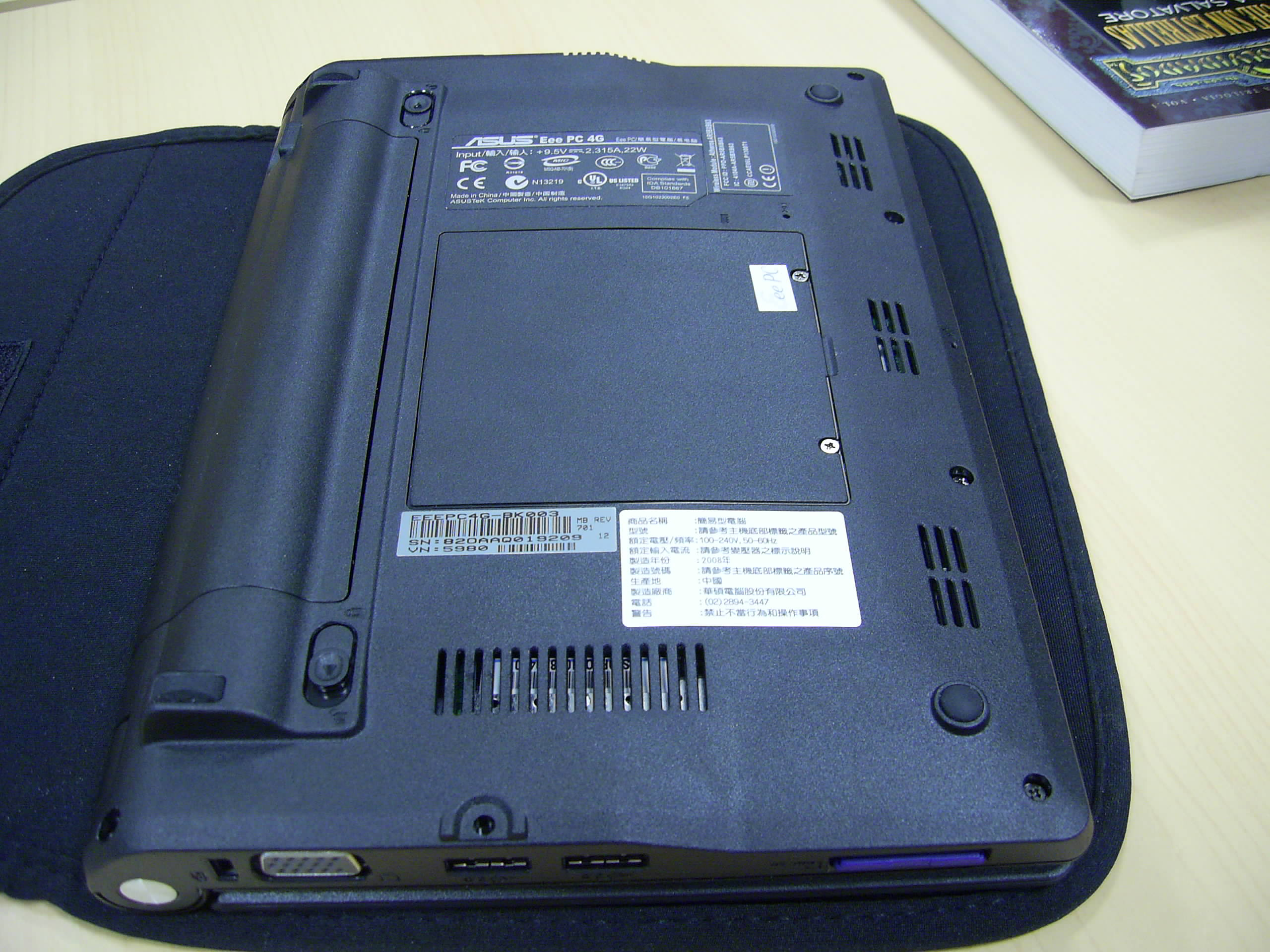 es: ASUS Eee PC vista inferior